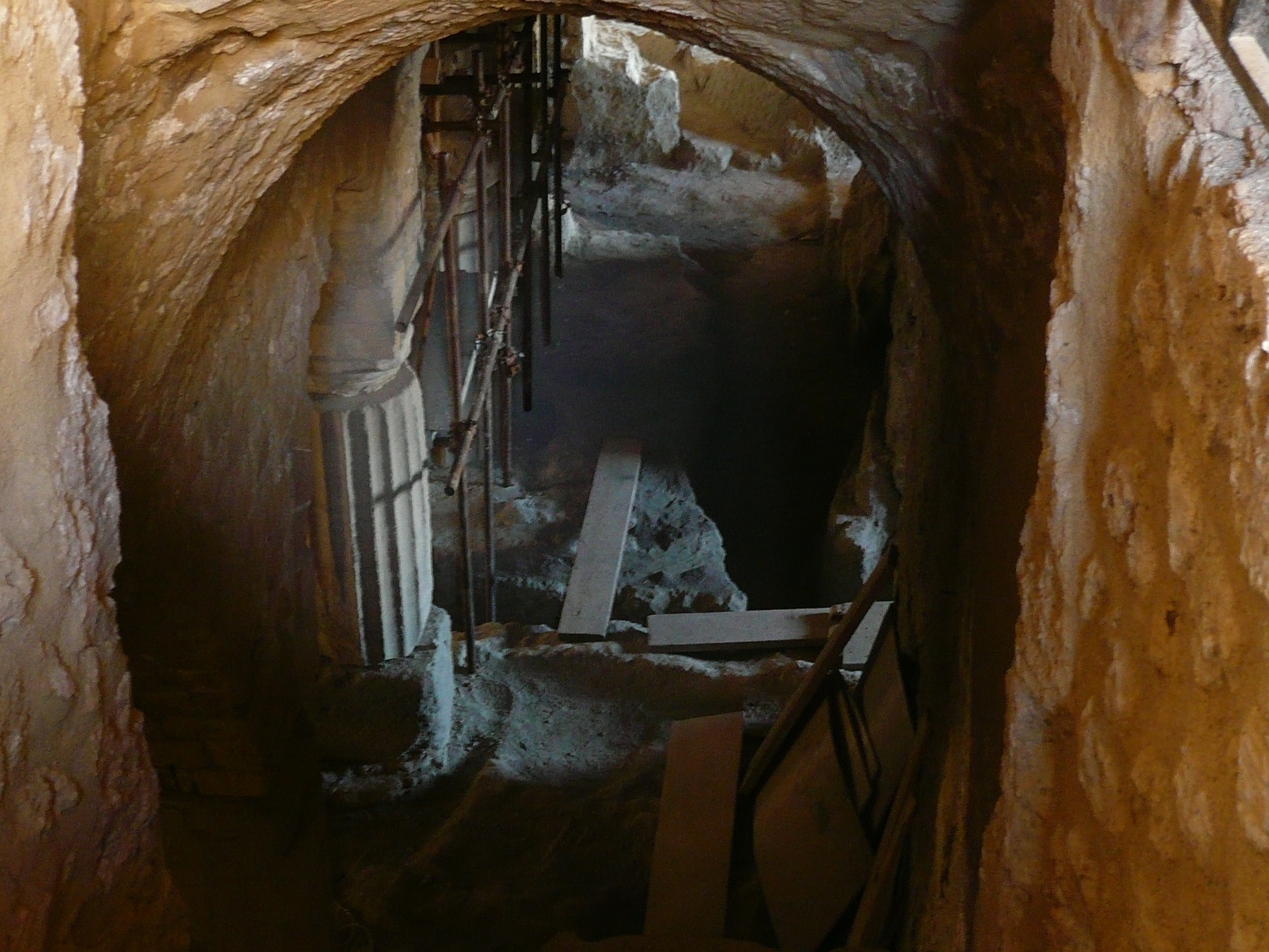 romitorio in cui erano collocate le celle dei monaci Basiliani a Castel dell'Ovo (Napoli). Autore foto: Roberto De Martino